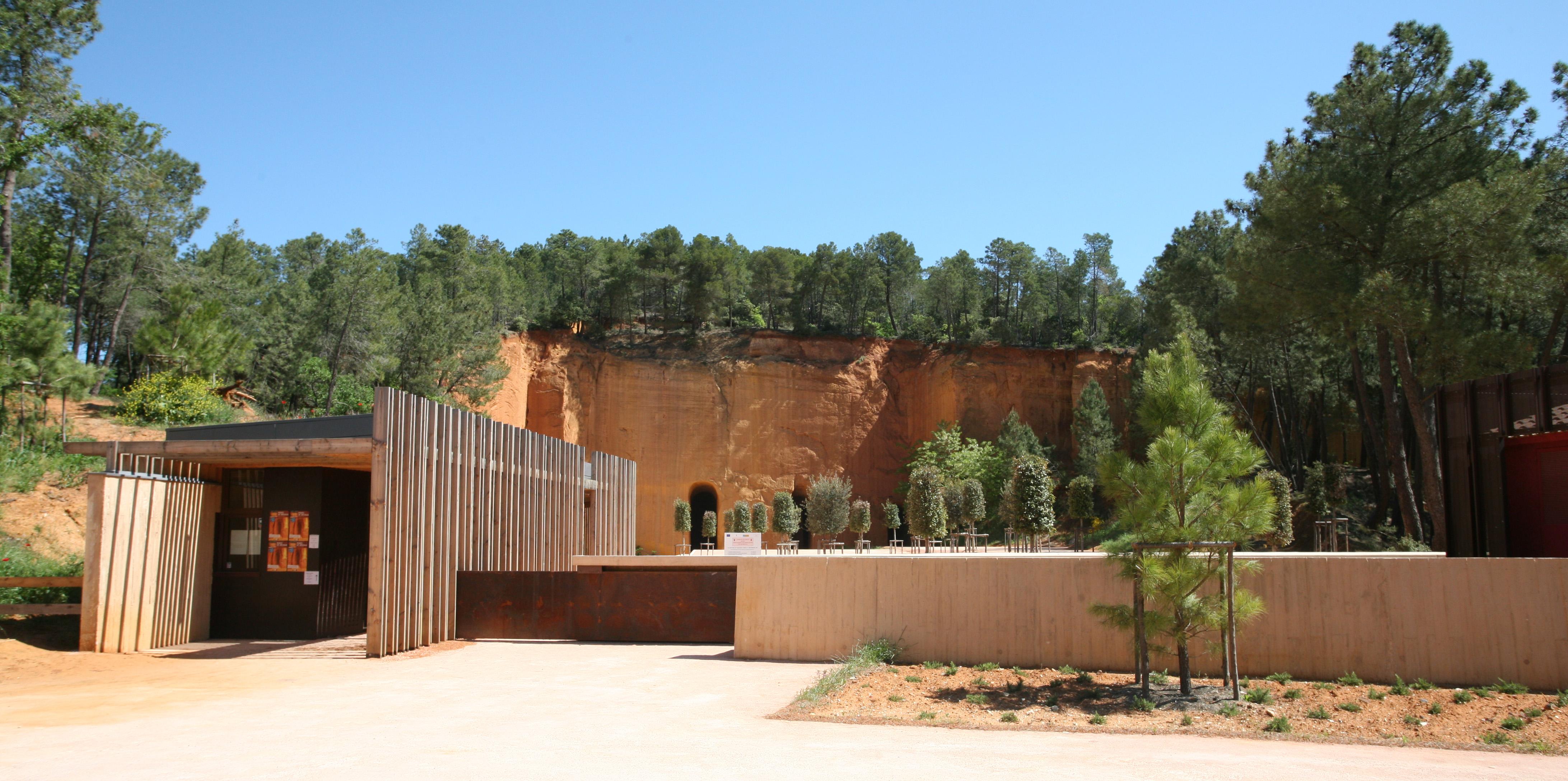 Les mines de Bruoux, Gargas, Vaucluse, France